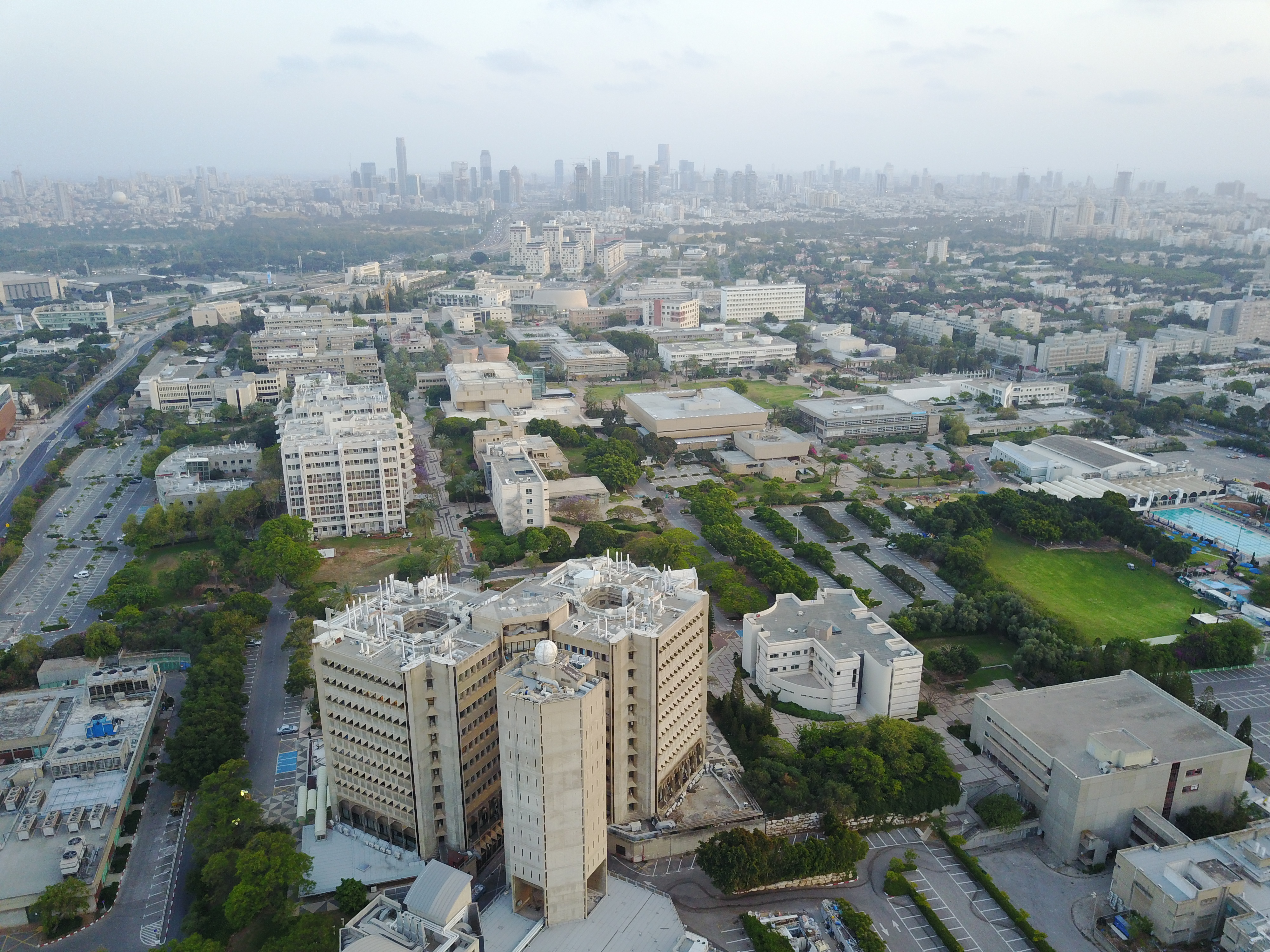 אוניברסיטת תל אביב בצילום אוויר